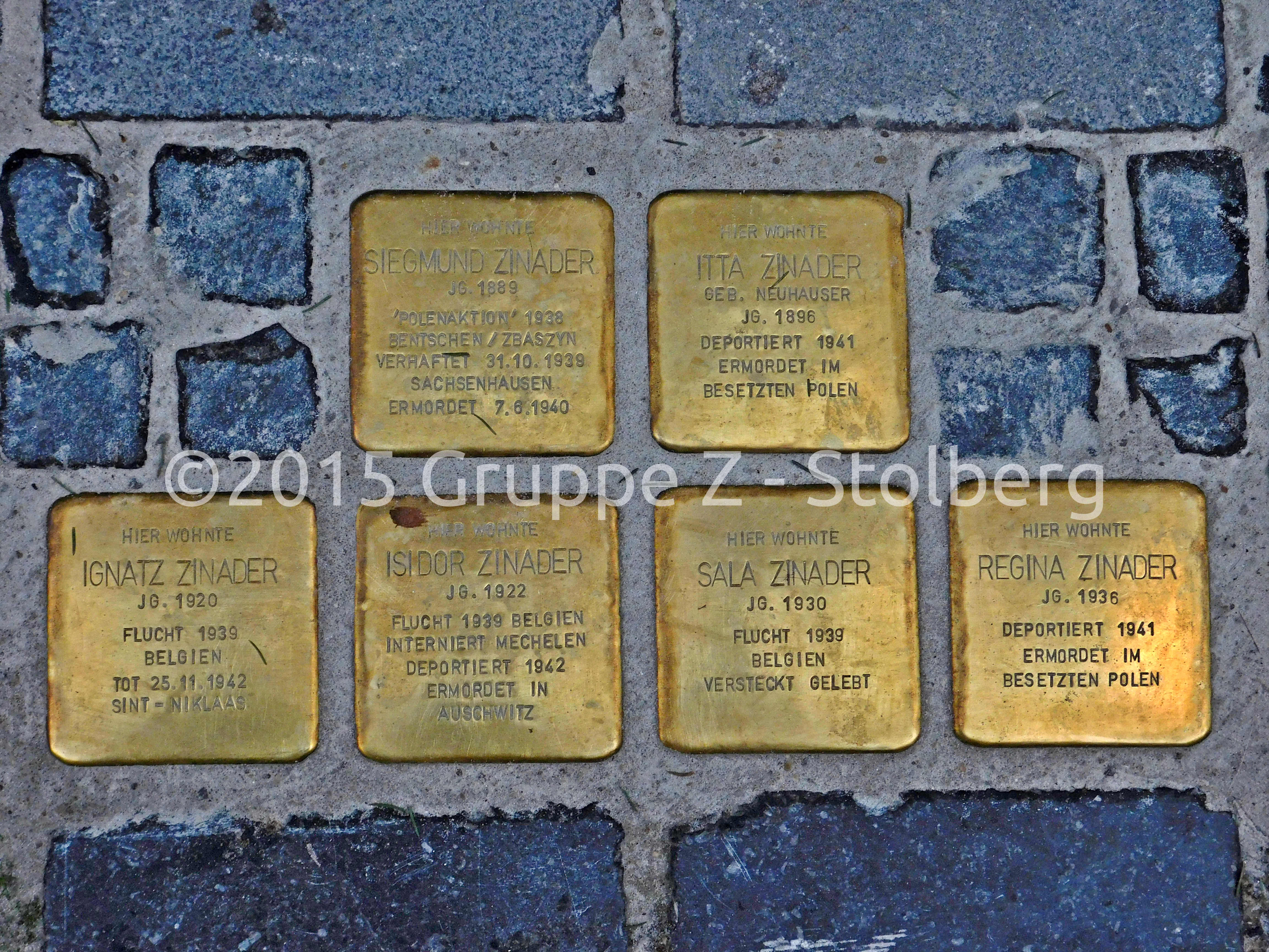 Stolpersteine für Familie Zinader verlegt am 18. Dezember 2015